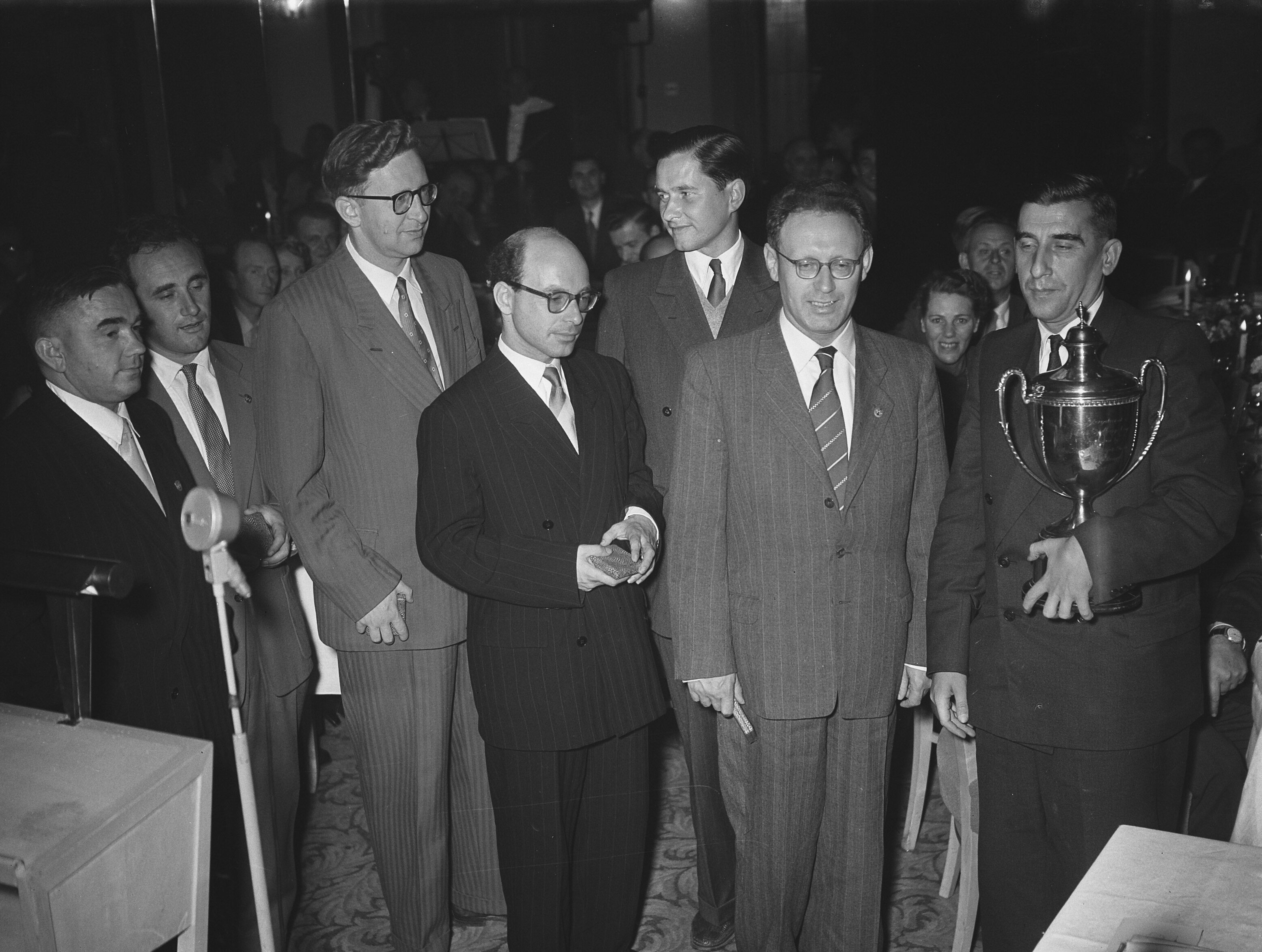 Collectie / Archief : Fotocollectie Anefo Reportage / Serie : [ onbekend ] Beschrijving : Prijsuitreiking schaakolympiade Amsterdam Datum : 25 september 1954 Locatie : Amsterdam, Noord-Holland Trefwoorden : Prijsuitreikingen, schaakolympiades Persoonsnaam : fide Fotograaf : Bilsen, Joop van / Anefo Auteursrechthebbende : Nationaal Archief Materiaalsoort : Glasnegatief Nummer archiefinventaris : bekijk toegang 2.24.01.09 Bestanddeelnummer : 906-7459